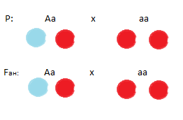 Схема анализирующего скрещивания